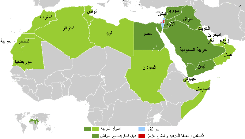 خريطة الدول العريبة و الدولة العبرية